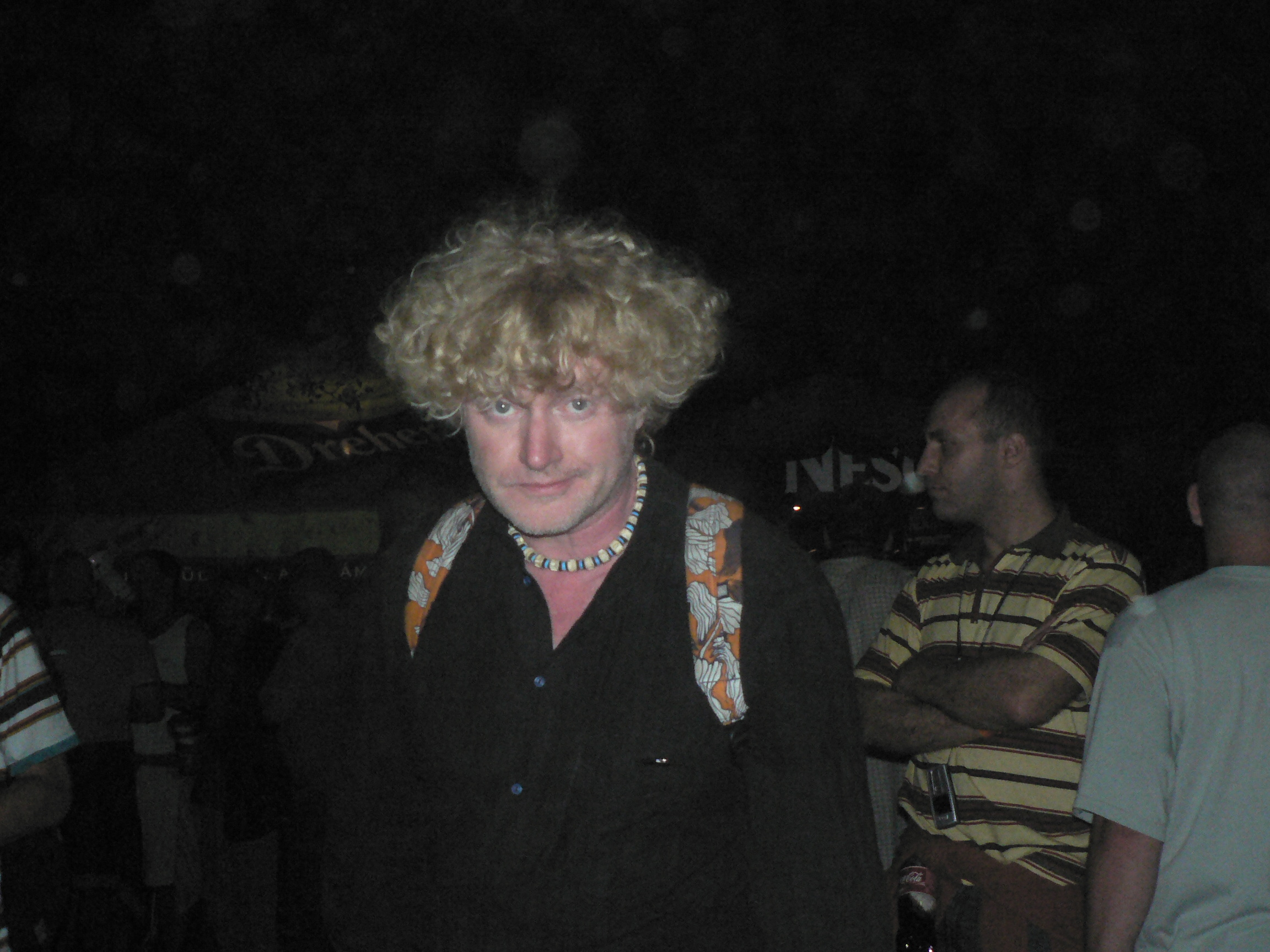 Müller Péter Sziámi. A kép korábban megjelent a Metapolisz 6 DVD-n (ISBN: 963-06-0653-4). A felvétel megjelent Creative Commons alatt a Metapolisz DVD sorozatban.